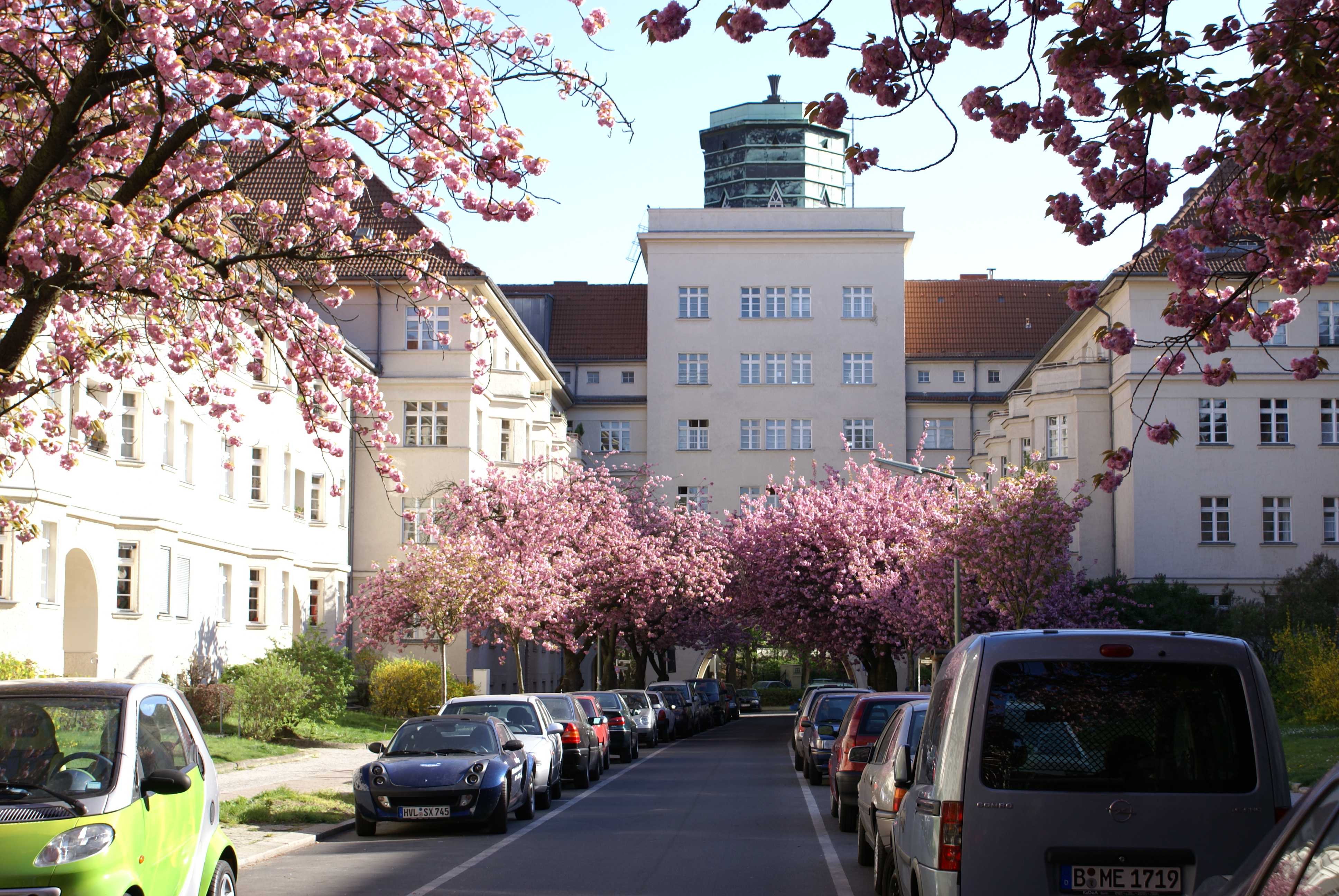 Blick zum Torbogen in den Ceciliengärten Berlin.